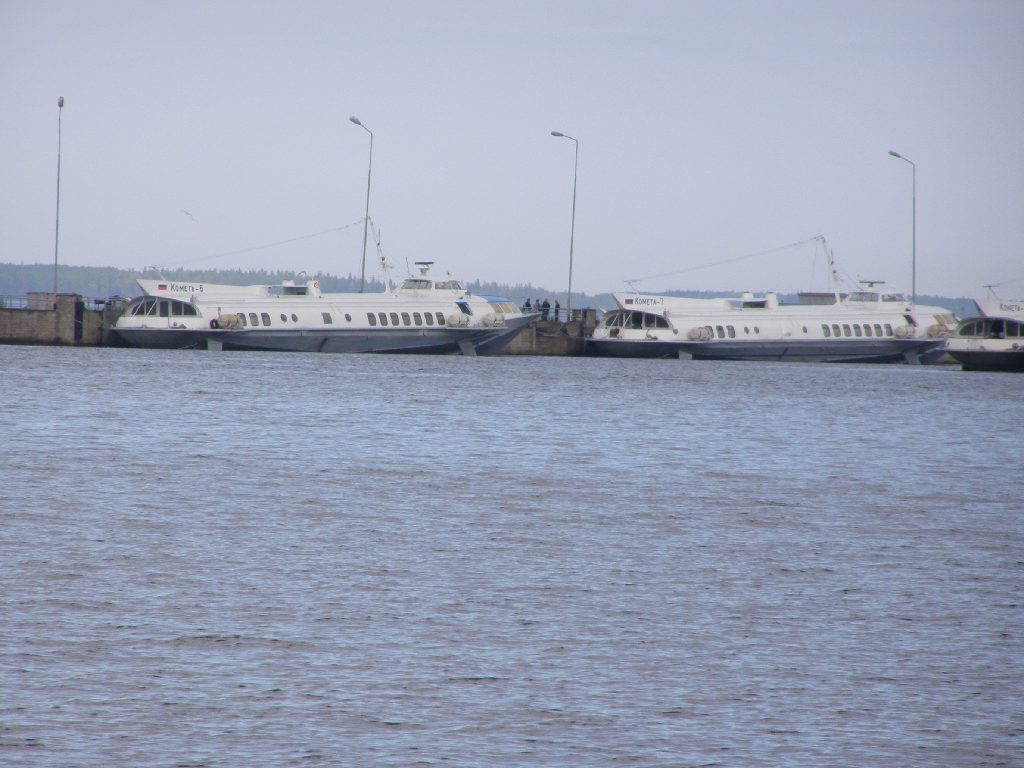 Пристань города Петрозаводска